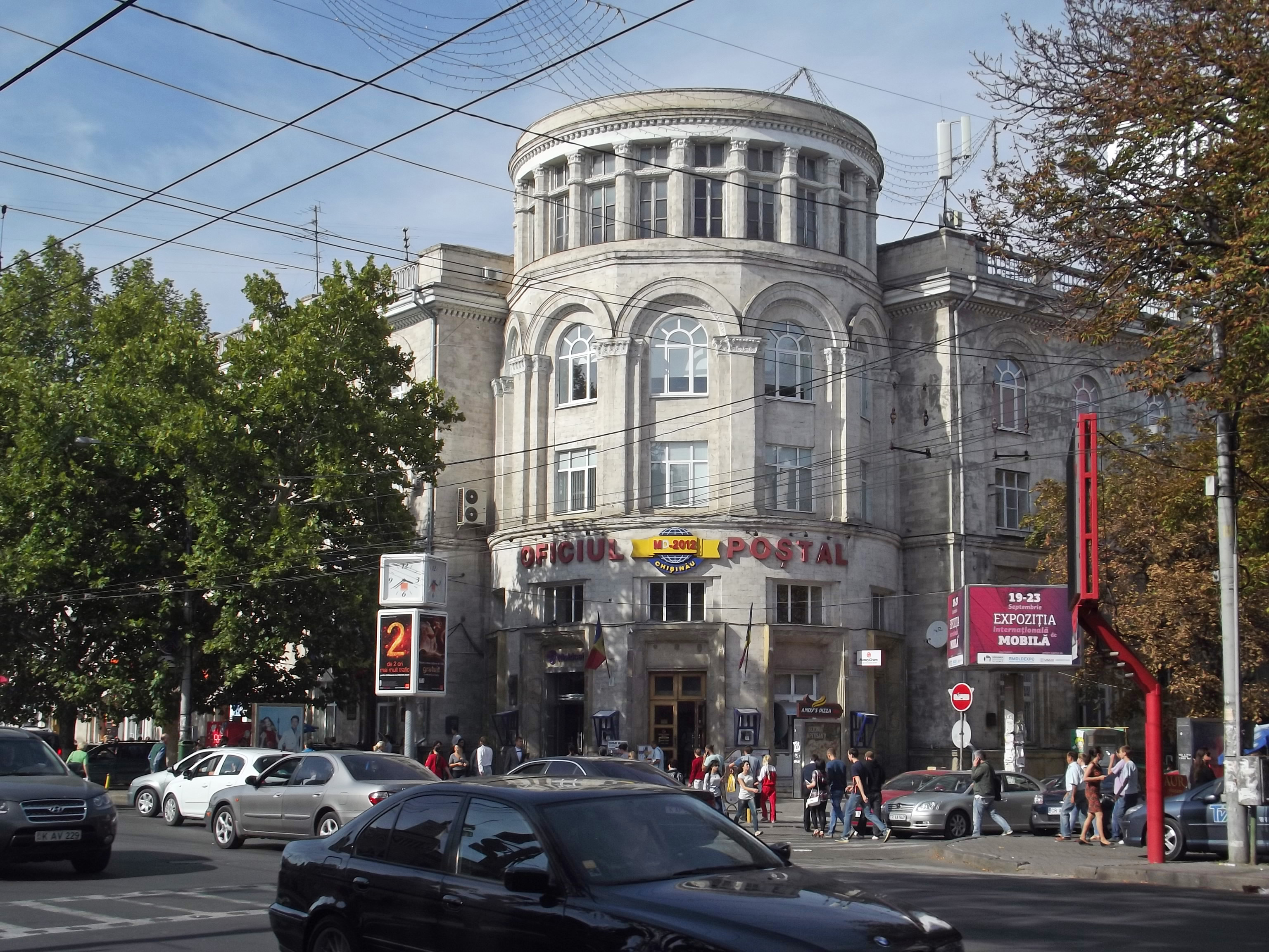 Почтамт